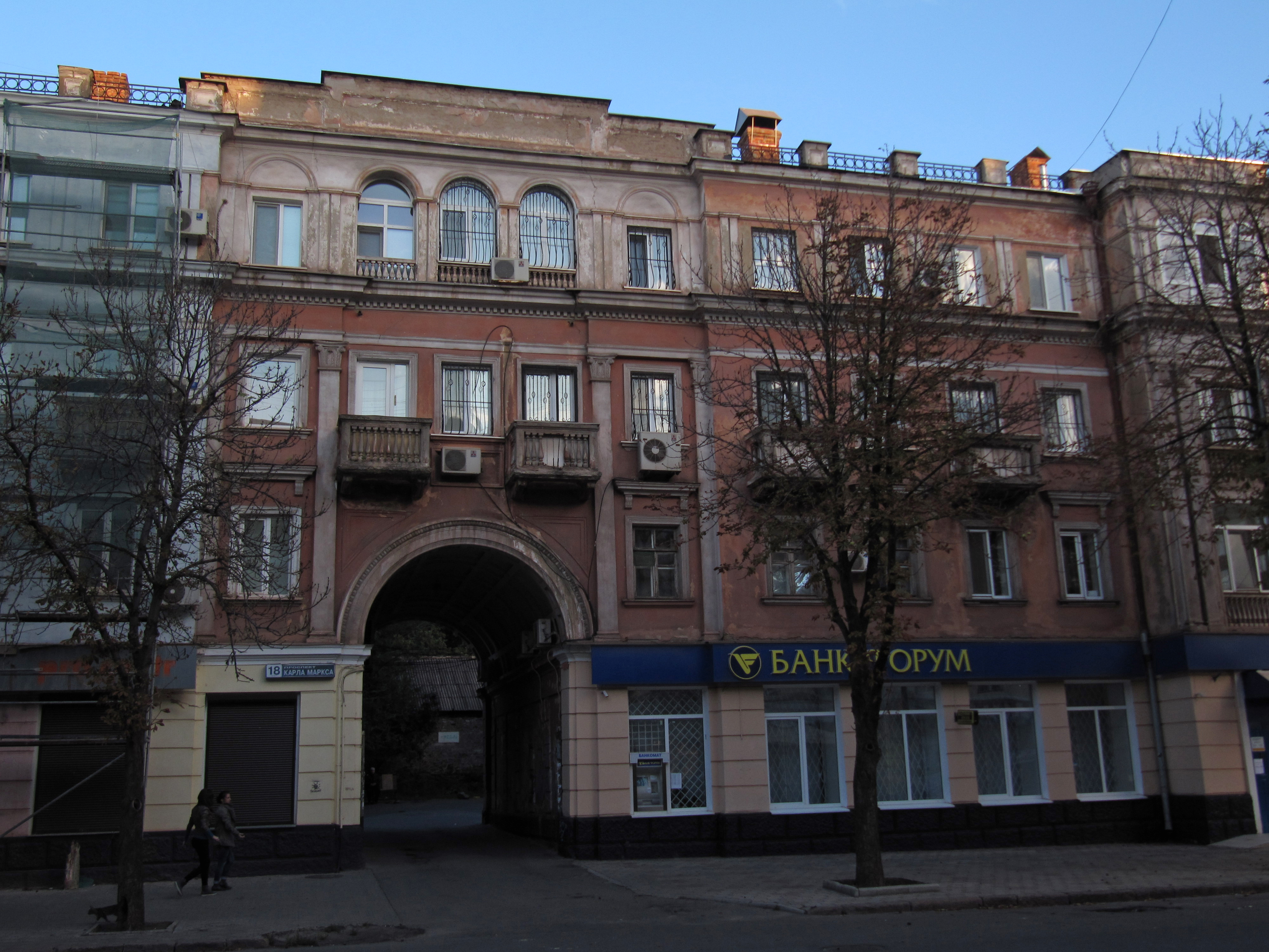 Житловий будинок, Карла Маркса 18, (1948р.) Цей файл є дублем, через помилку сервера сталося подвійне завантаження, прошу видалити --WDKeeper (talk) 17:16, 30 September 2013 (UTC)